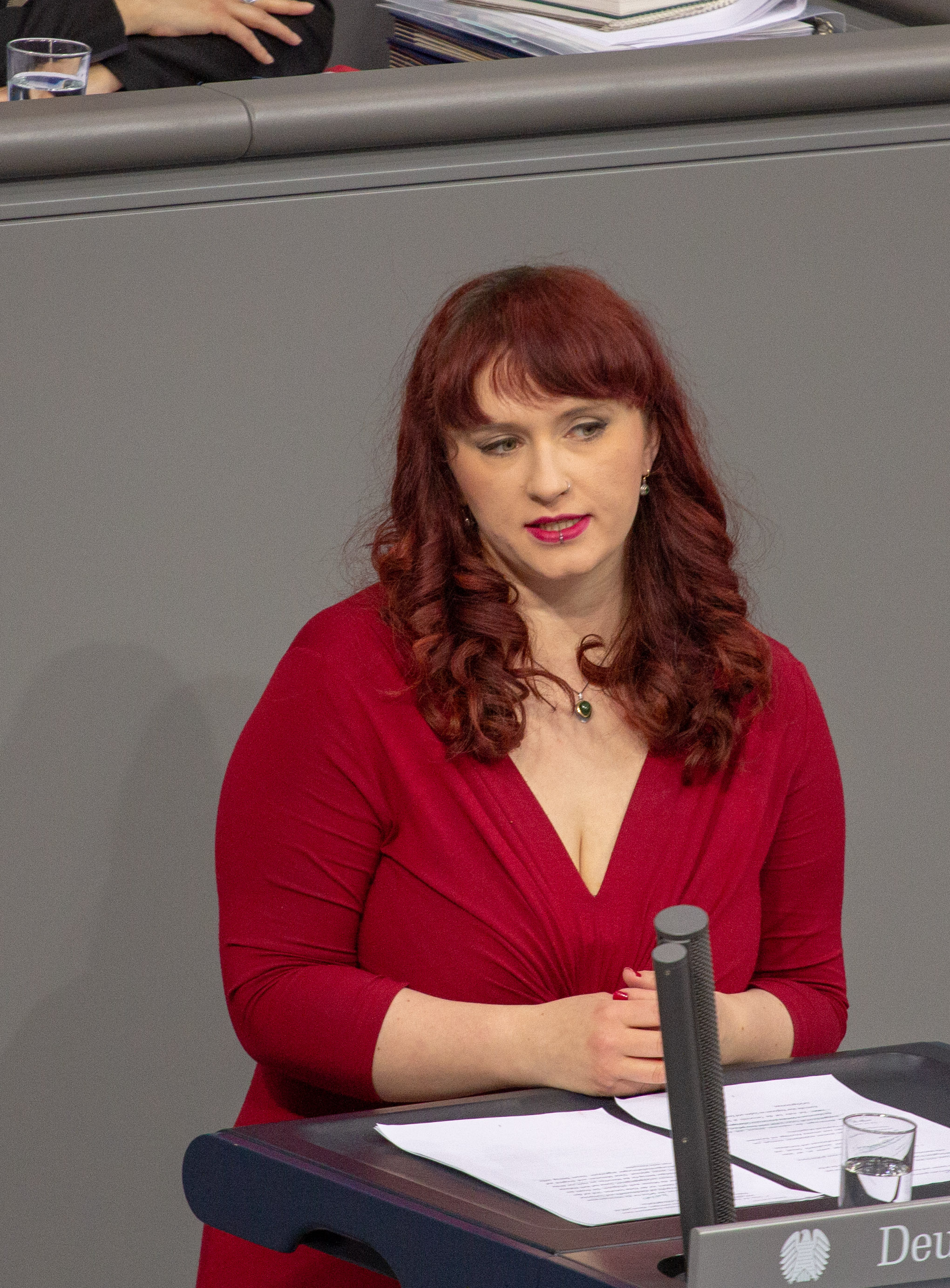 Agnieszka Brugger, Mitglied des Deutschen Bundestages, während einer Plenarsitzung am 11. April 2019 in Berlin.